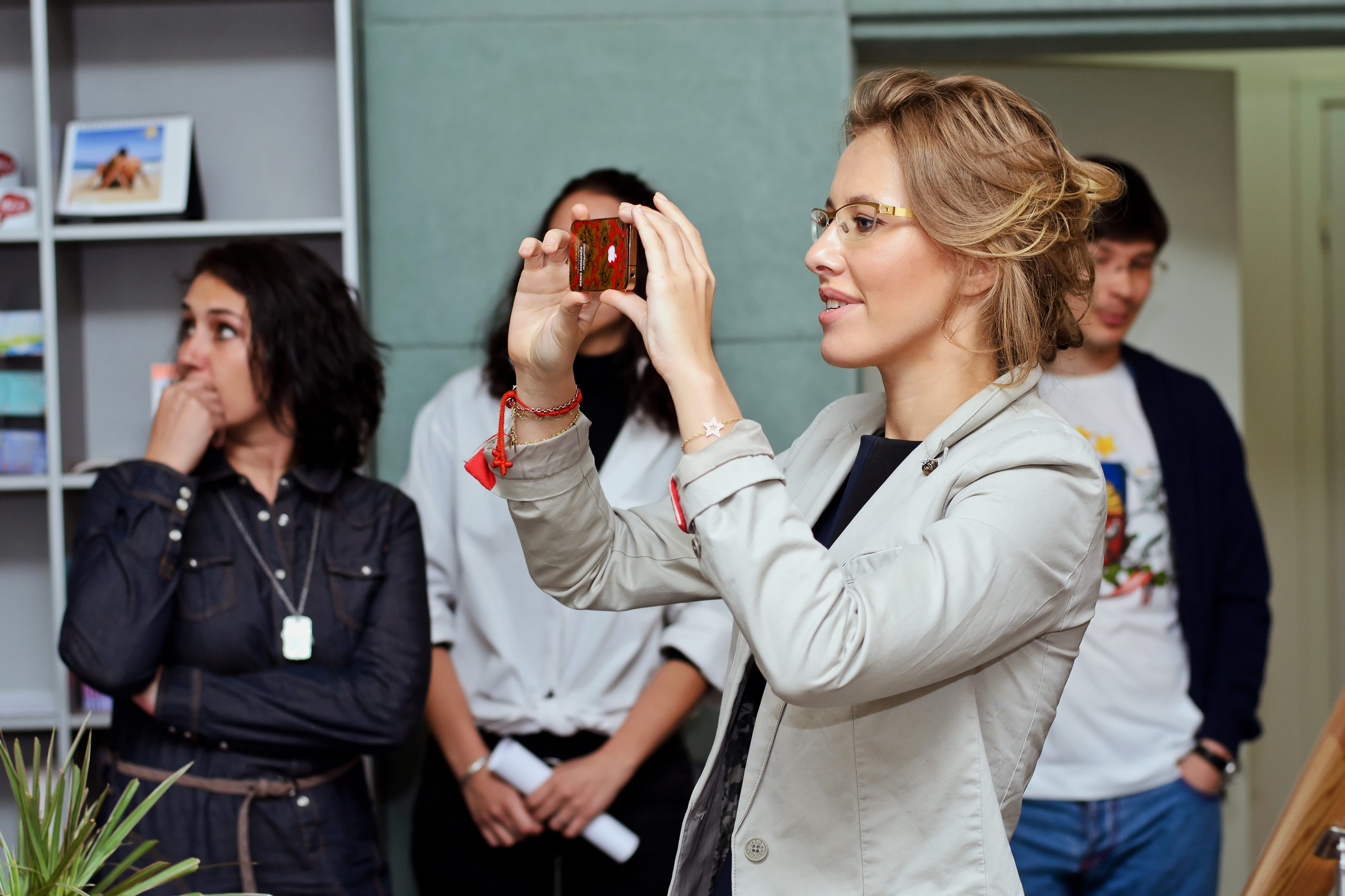 Ksenia